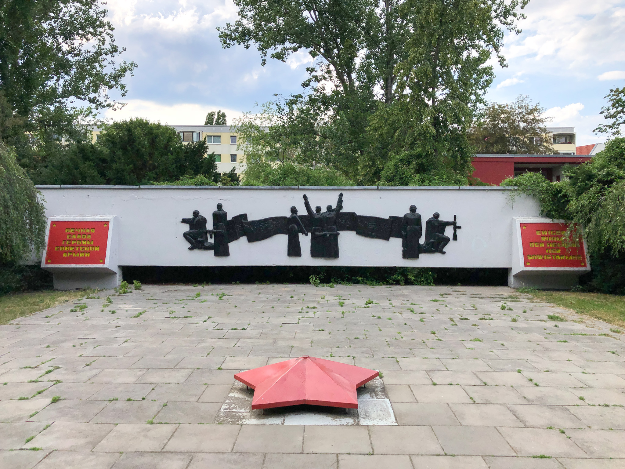 Blick auf das sowjetische Ehrenmal in Berlin Alt-Höhenschönhausen